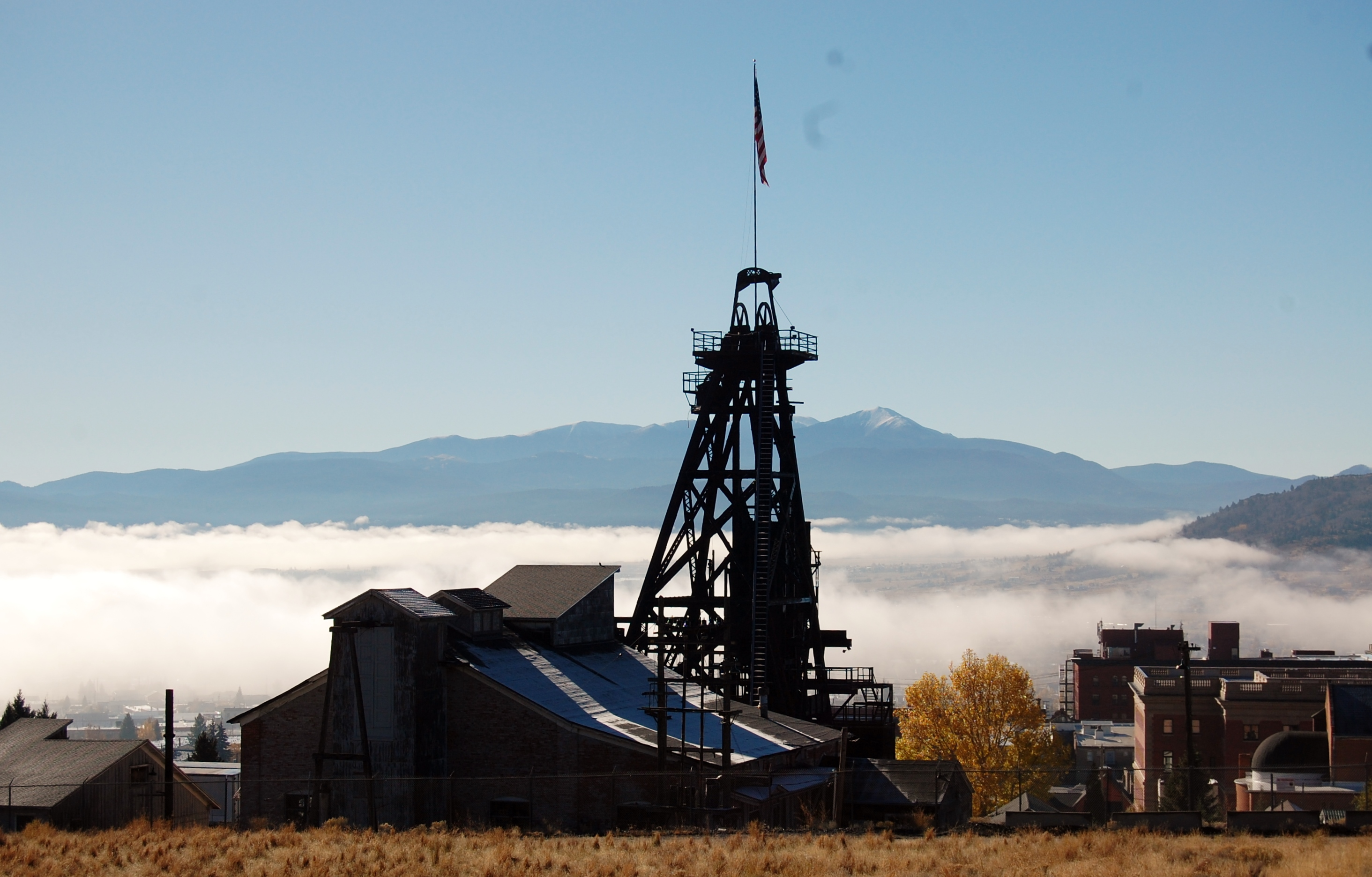 Butte, MT, USA